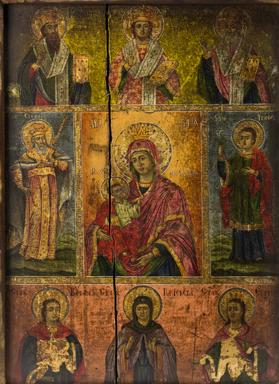 „Света Богородица с Христос и светители“, църква „Св. Кирил и Методий“, Тетово. 1857 година. Автор неидентифициран. Размери: 54,5 Х 37 Х 2 cm.